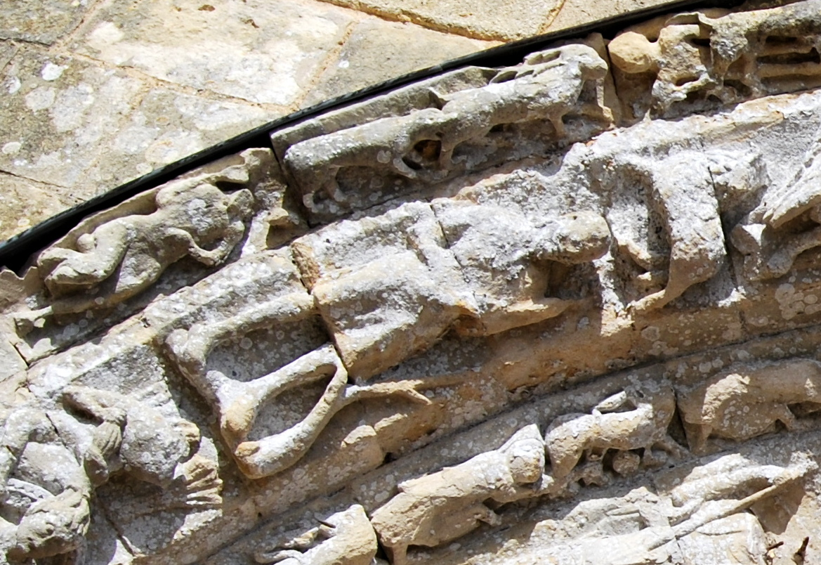 Détails du Zodiaque du Portail